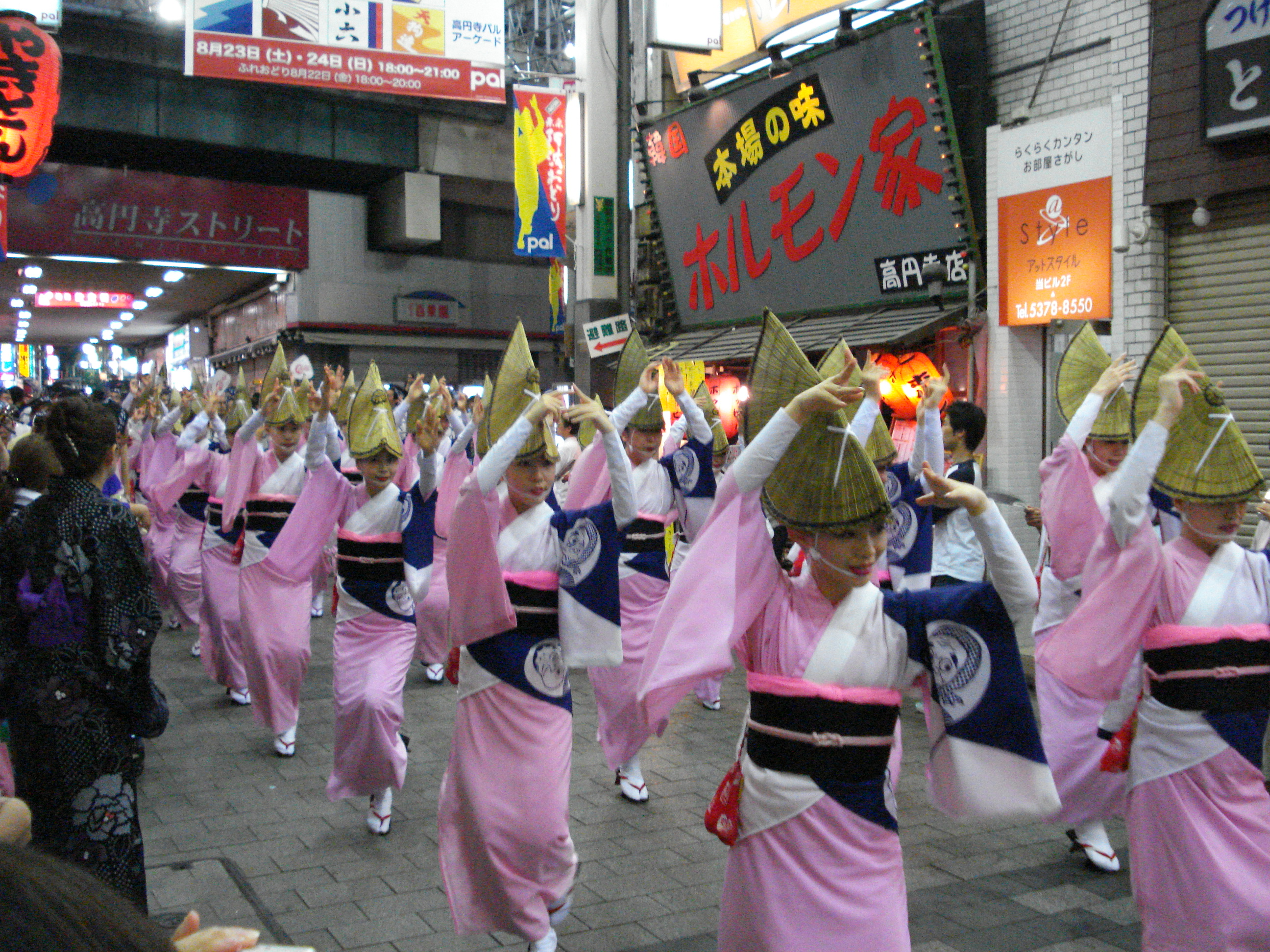 awaodori